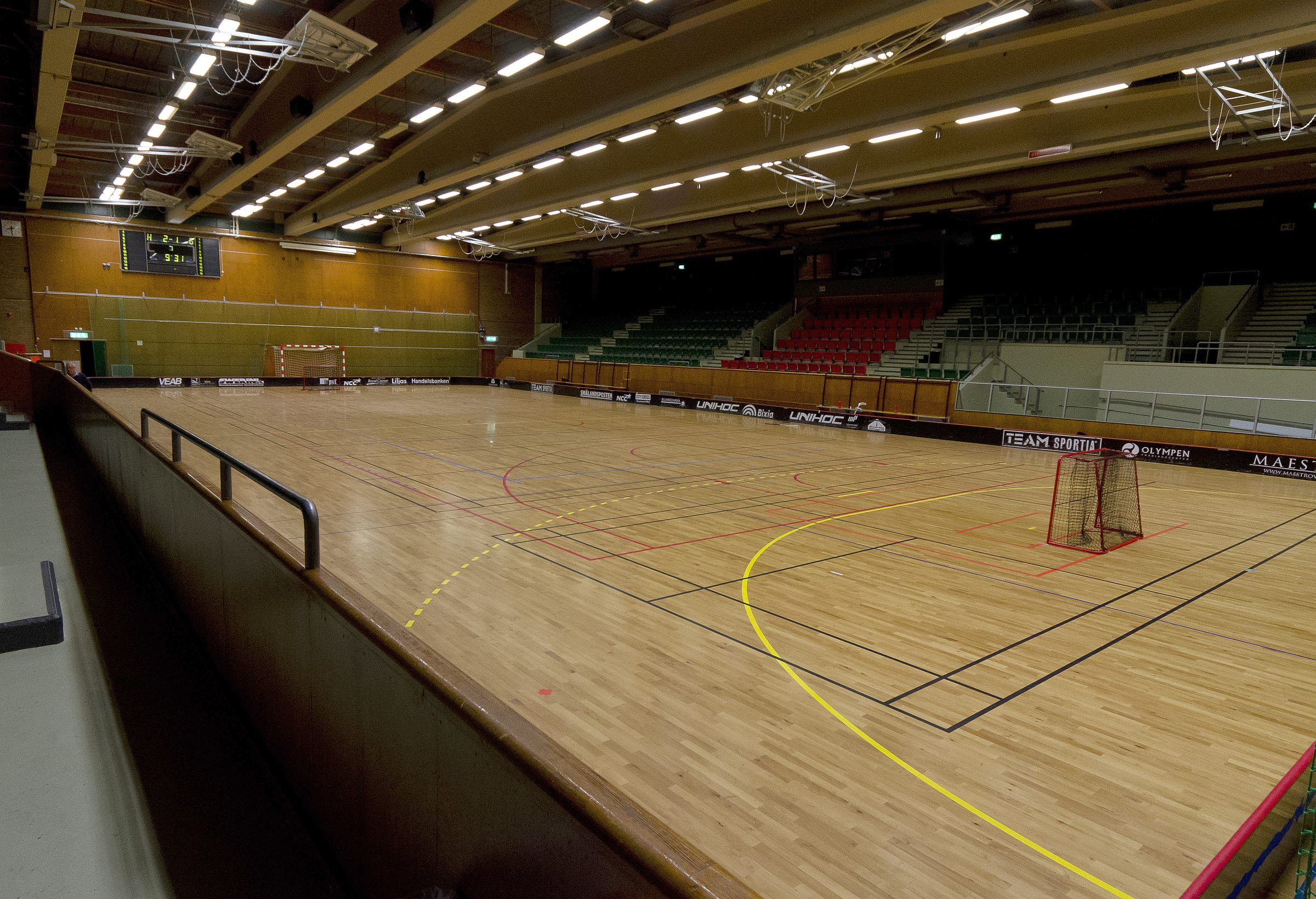 Teleborgshallen i södra Växjö, förberedd för innebandymatch.